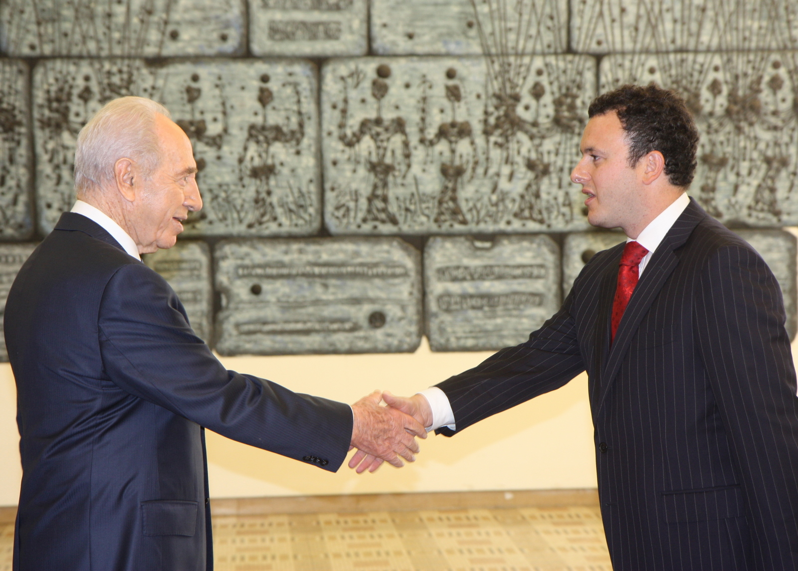 Ambassador presents his credentials